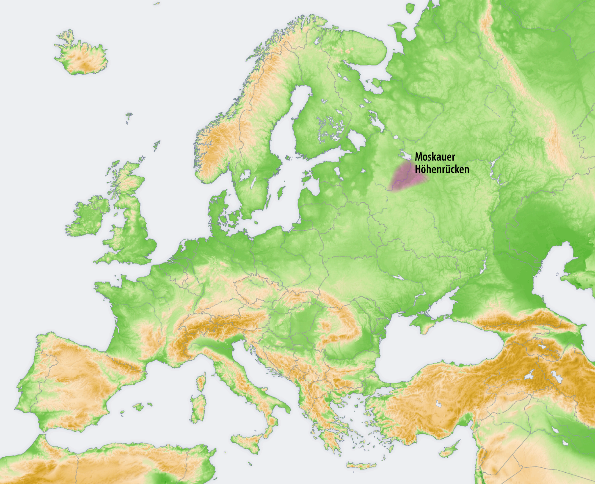 Landschaften der Osteuropäischen Ebene: Moskauer Höhenrücken